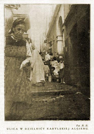 Ulica w dzielnicy Kabylskiej Algieru - fotografia Romualda Balaweldera, opublikowana w artykule Kartki z podróży do Afryki w lipcu 1928 roku.